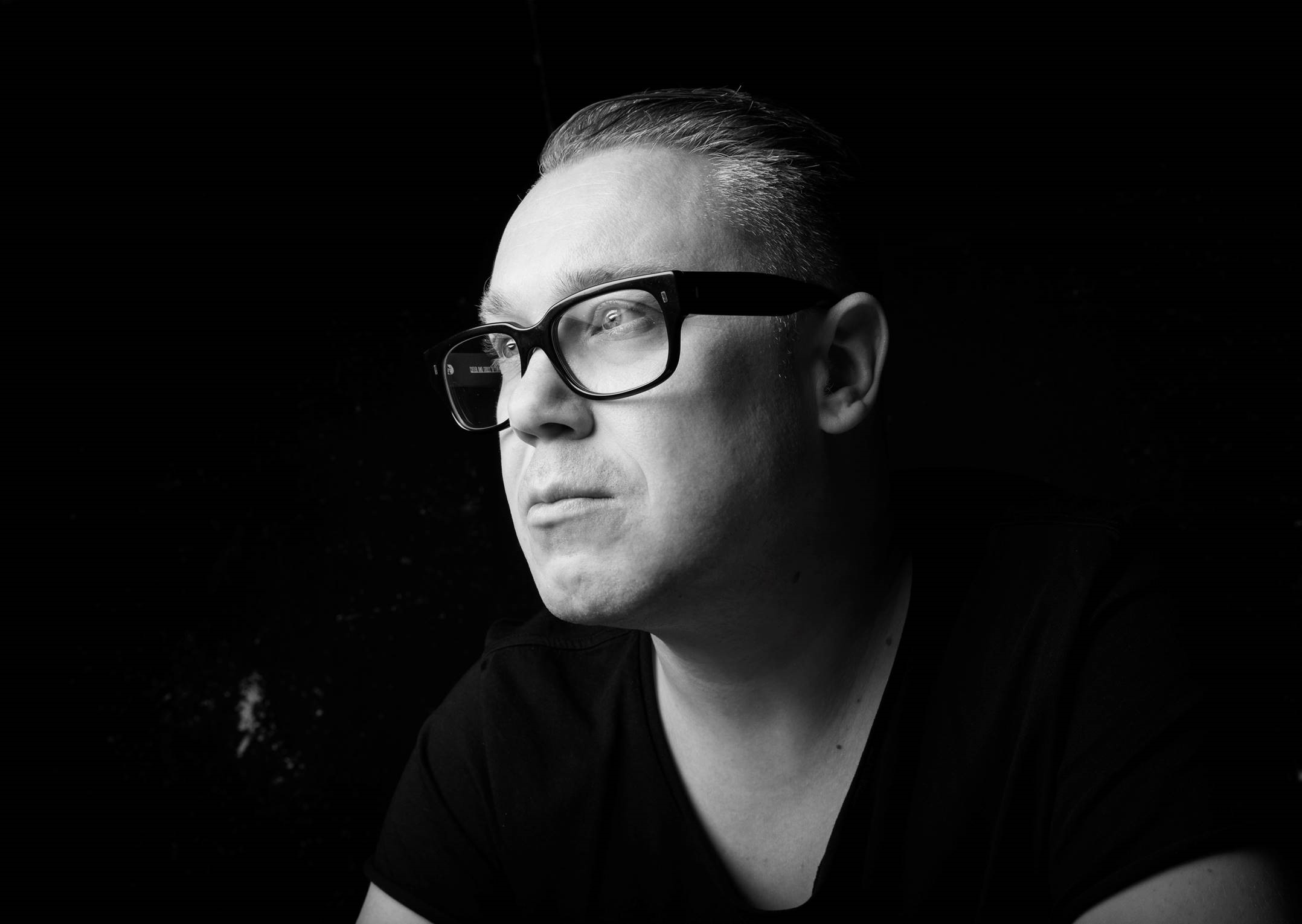 Luuk Cox Producer